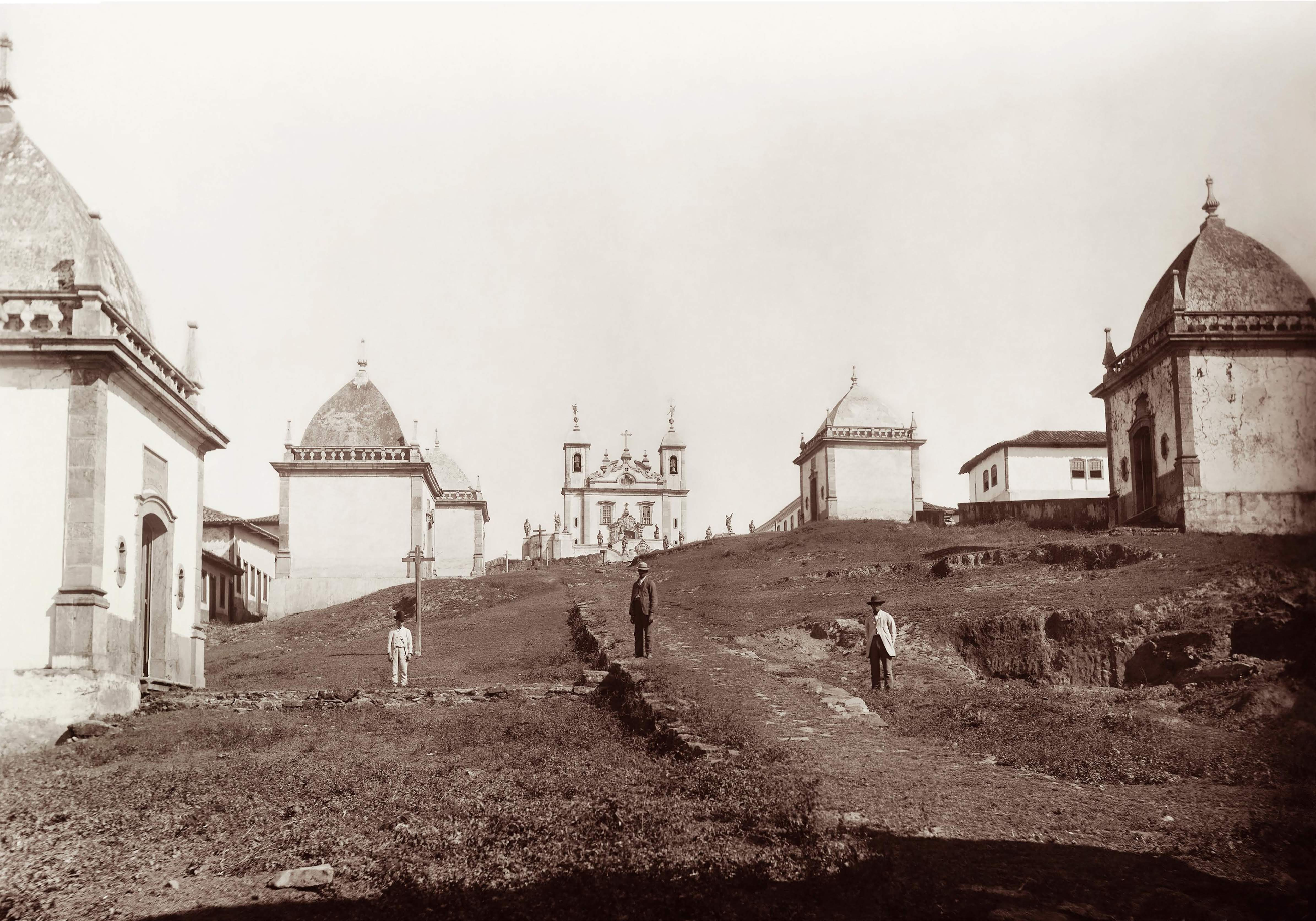 Fotografia de Marc Ferrez do Santuário recém concluído, ainda sem paisagismo